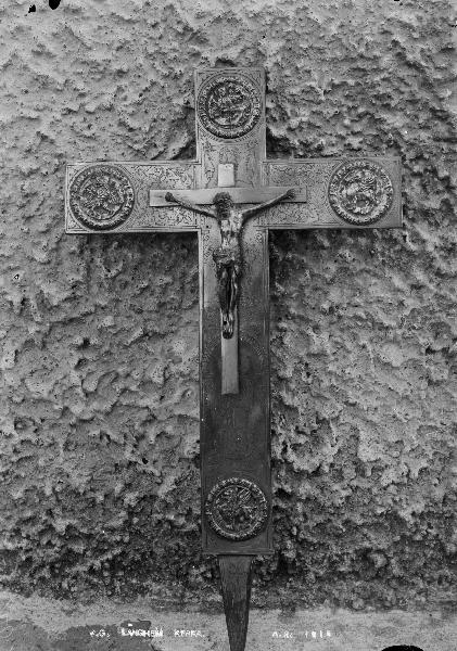 Krucifix, silver, rikt graverat, mitten av 1500-talet. Kategori: (05) KrucifixKrucifix, silver, rikt graverat, mitten av 1500-talet.